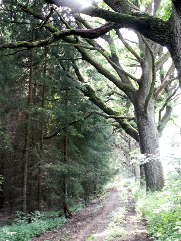 Pohled od východu na alej památných dubů jižně od Broumova (Okres Tachov).